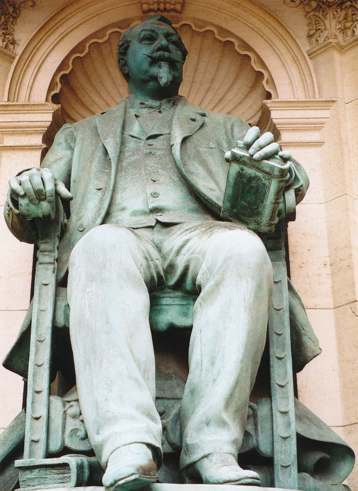 Alexandre Le Grand, Gründer des Palais Bénédictine Datum: 19. Jahrhundert Urheber: (mir) unbekannter Bildhauer Urheber der Fotografie: selbst erstelltes Foto Quelle: privates Fotoalbum des Urhebers der Fotografie